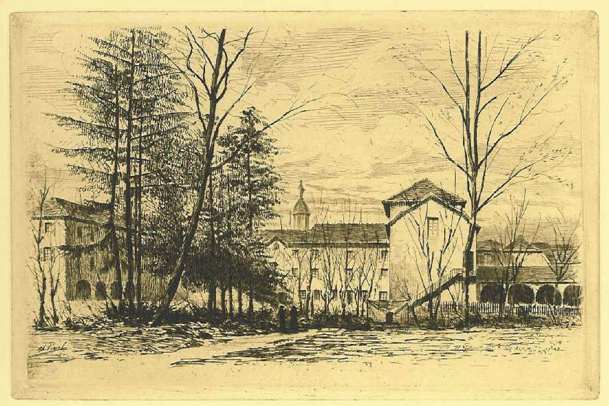 parc du collège de Thoissey (Ain) - dessin de Charles Pinet (fichier-image basse définition)